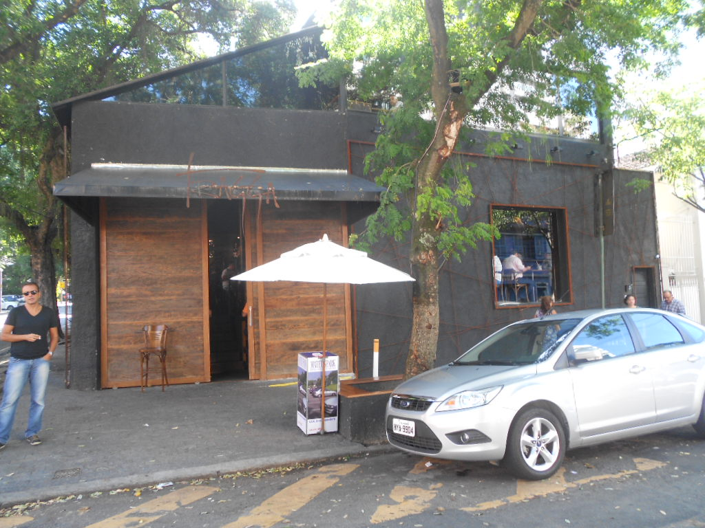 Tragga - restaurante argentino, situado na Rua Capitão Salomão, em Humaitá, Rio de Janeiro, Brasil.